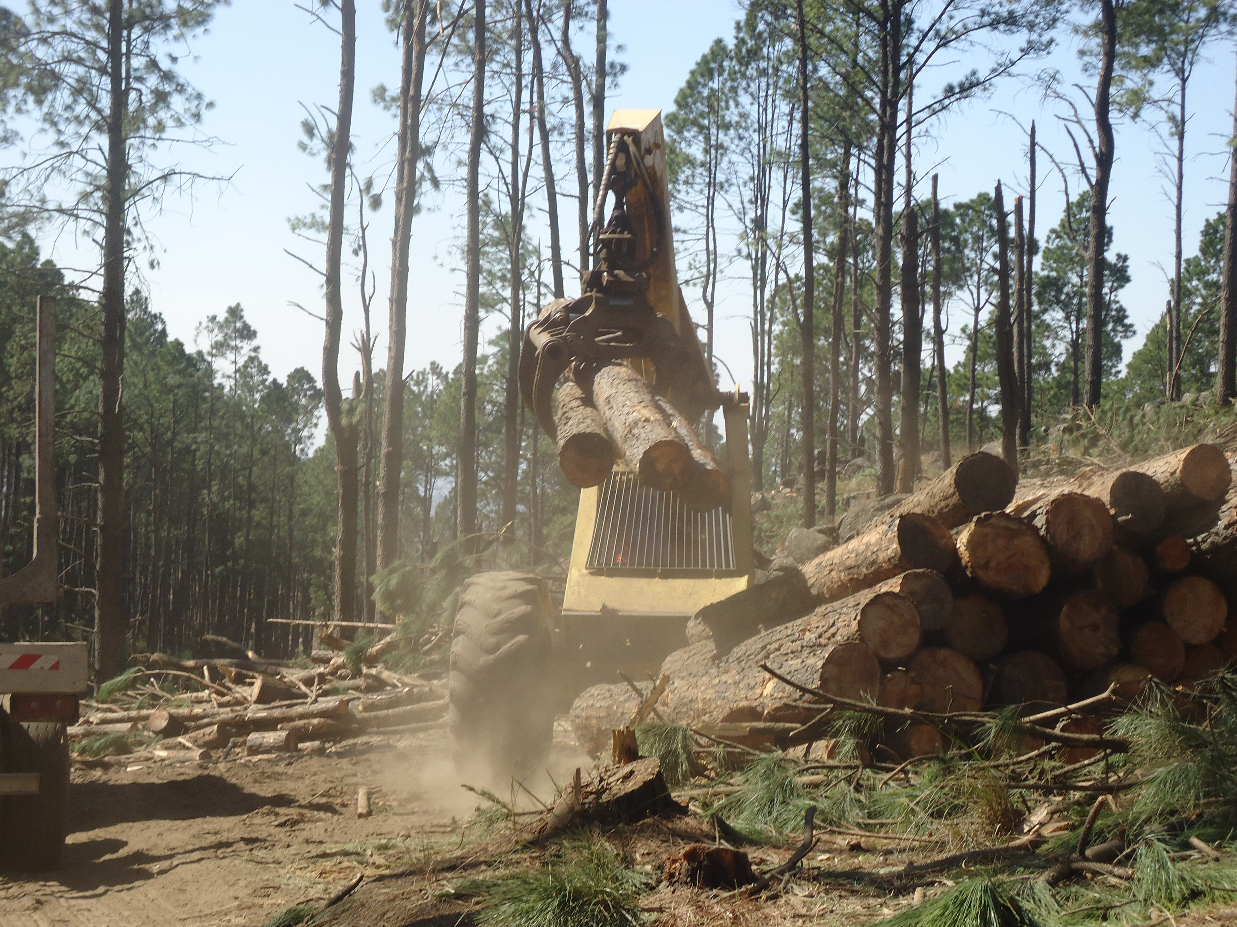 Aprovechamiento de uso múltiple